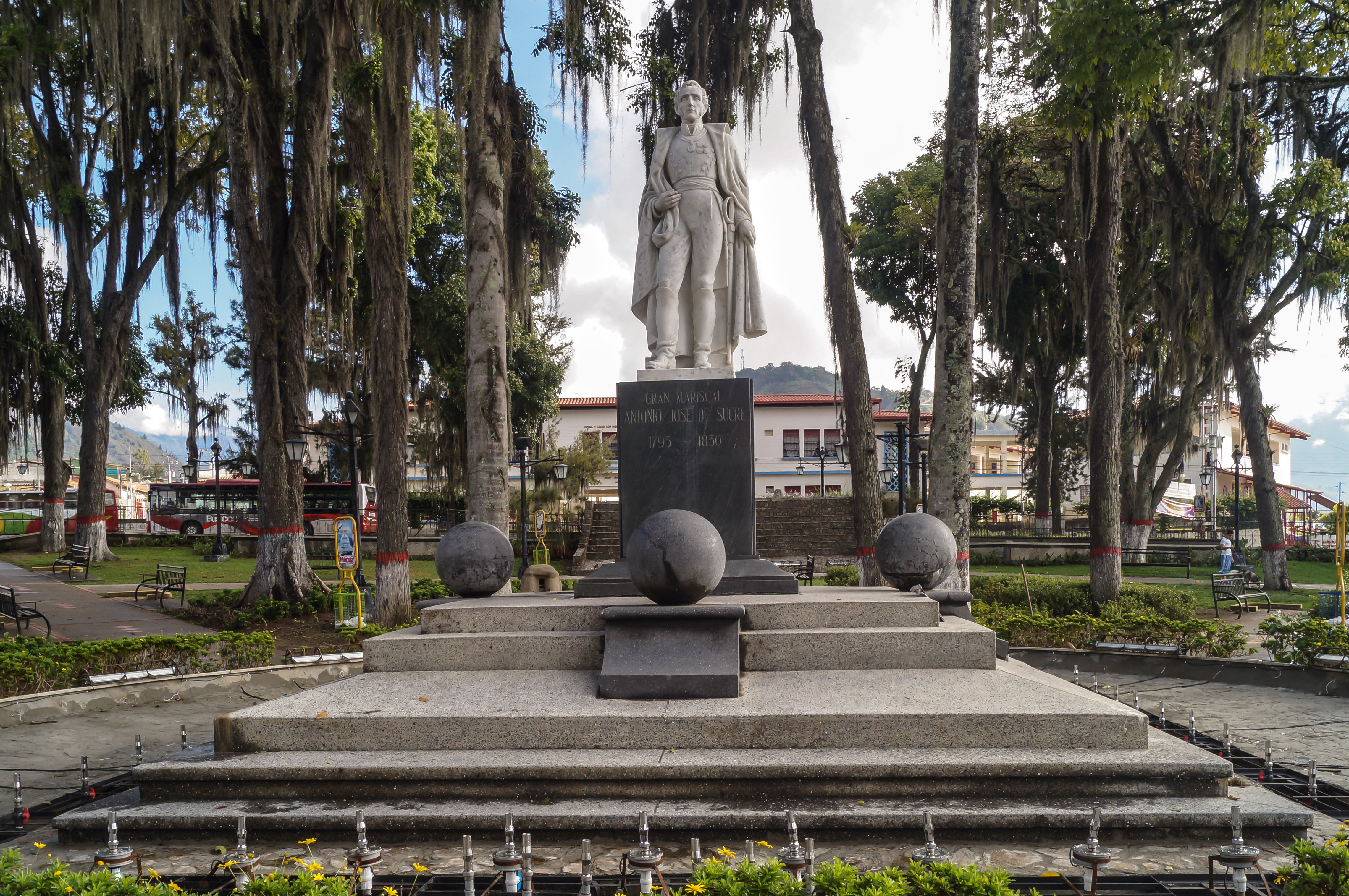 Conocida como La plaza Sucre o La plaza Milla. Ubicada en la parte alta del casco urbano de la ciudad, en la parroquia del mismo nombre, es una de las más antiguas. A partir de 1895 la plaza está dedicada a la memoria del héroe Antonio José de Sucre; el Gran Mariscal de Ayacucho, con motivo del centenario de su nacimiento, de allí que su nombre oficial es el de Plaza Gran Mariscal de Ayacucho Antonio José de Sucre. En el centro de la plaza se encuentra una estatua pedestre de Sucre en mármol blanco, erigida en 1949. Mérida. Venezuela.